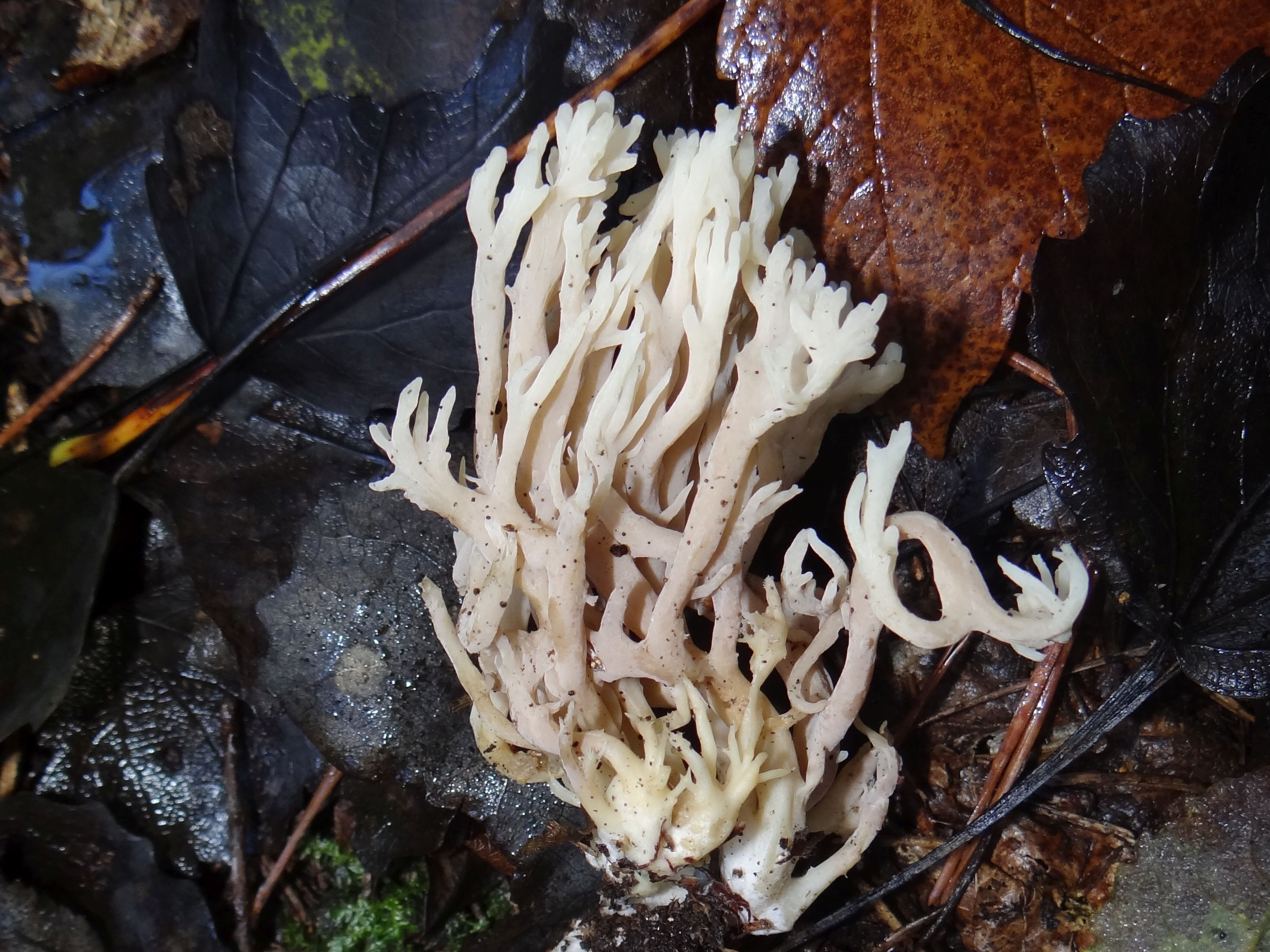 Ramaria pallida (location: Poland, Kamionna (województwo małopolskie)